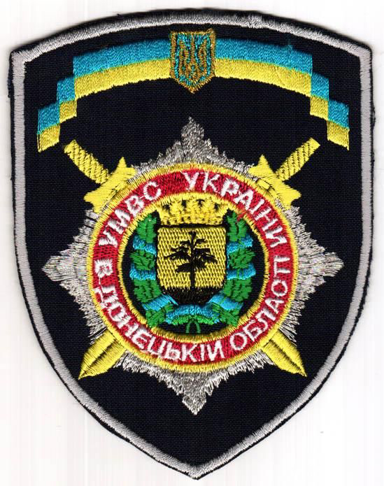 Шеврон УМВД Украины в Донецкой области